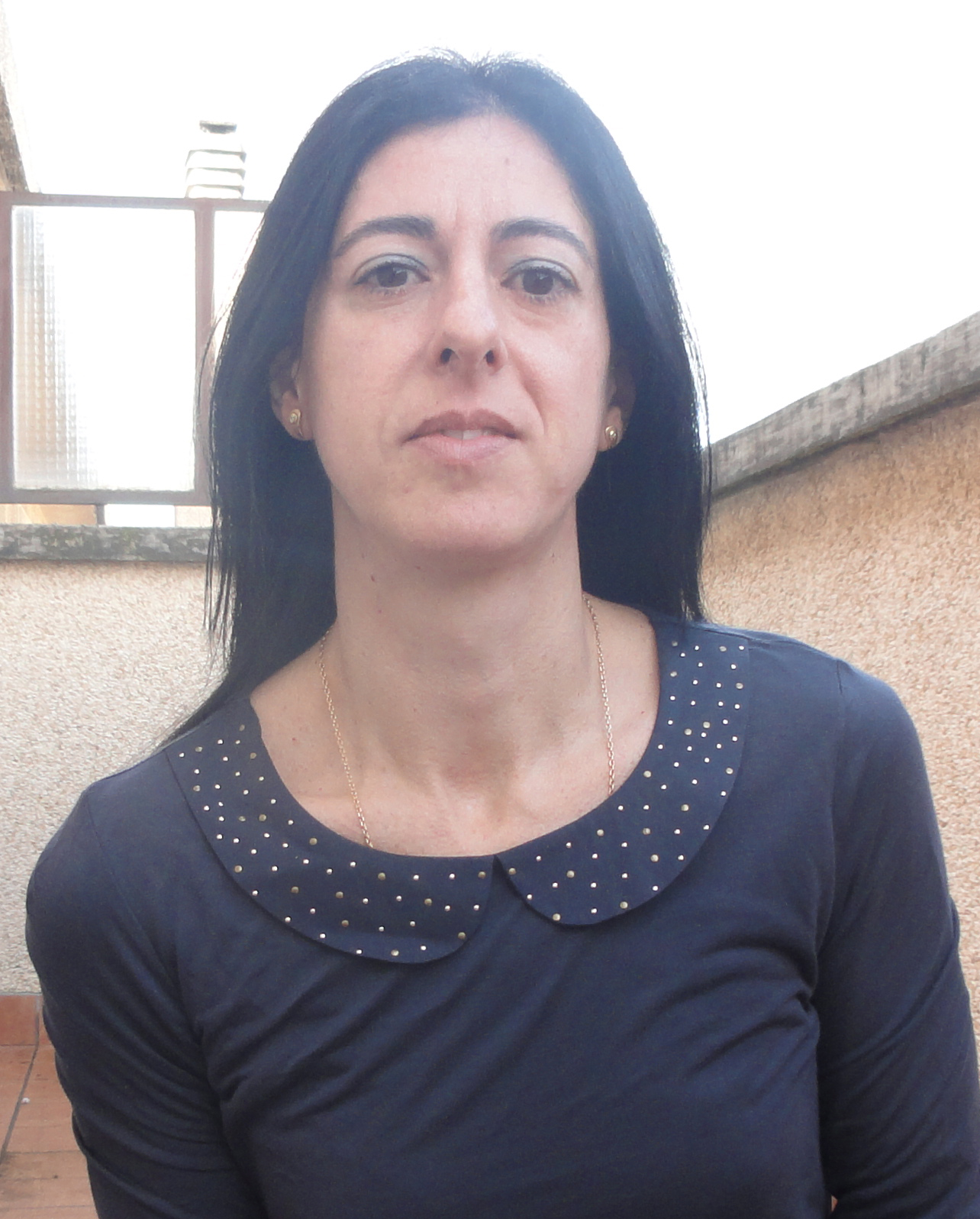 Fotografía de la escritora Begoña Pro.